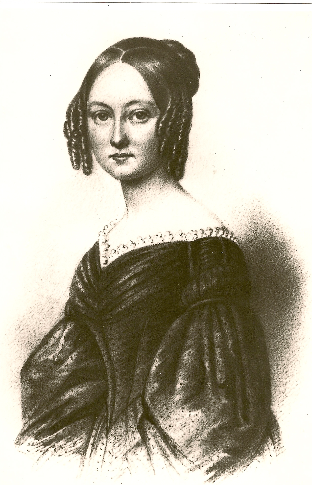 Carolina Printzensköld (1815-1886), gift 1840 med kyrkoherde P.A. Almqvist i Hakarp.